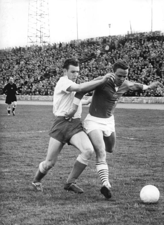 Zentralbild-Wendorf-Trebing Tre-Le 29.4.1962 ASK Vorwärts Berlin siegte 3:1 Vor etwa 10.000 Zuschauern besiegte der ASK Vorwärts Berlin am 28.4.1962 in einem Fußball-Oberligaspiel im Stadion an der Cantianstraße den SC Motor Jena klar mit 3:1 Toren. UBz: Gleich kommt die Flanke vom ASK-Mittelstürmer [Jürgen] Nöldner (rechts), den hier der Jenaer Spieler Stricksner vergeblich zu bremsen versucht.